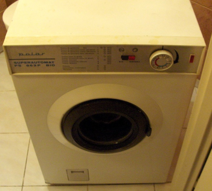 pralka polar ps 663 p bio